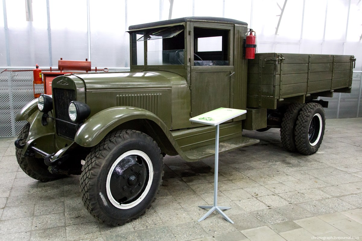 УАЗ-ЗИС-5В (годы выпуска 1942-1944). Выставочный павильон-музей УАЗа.